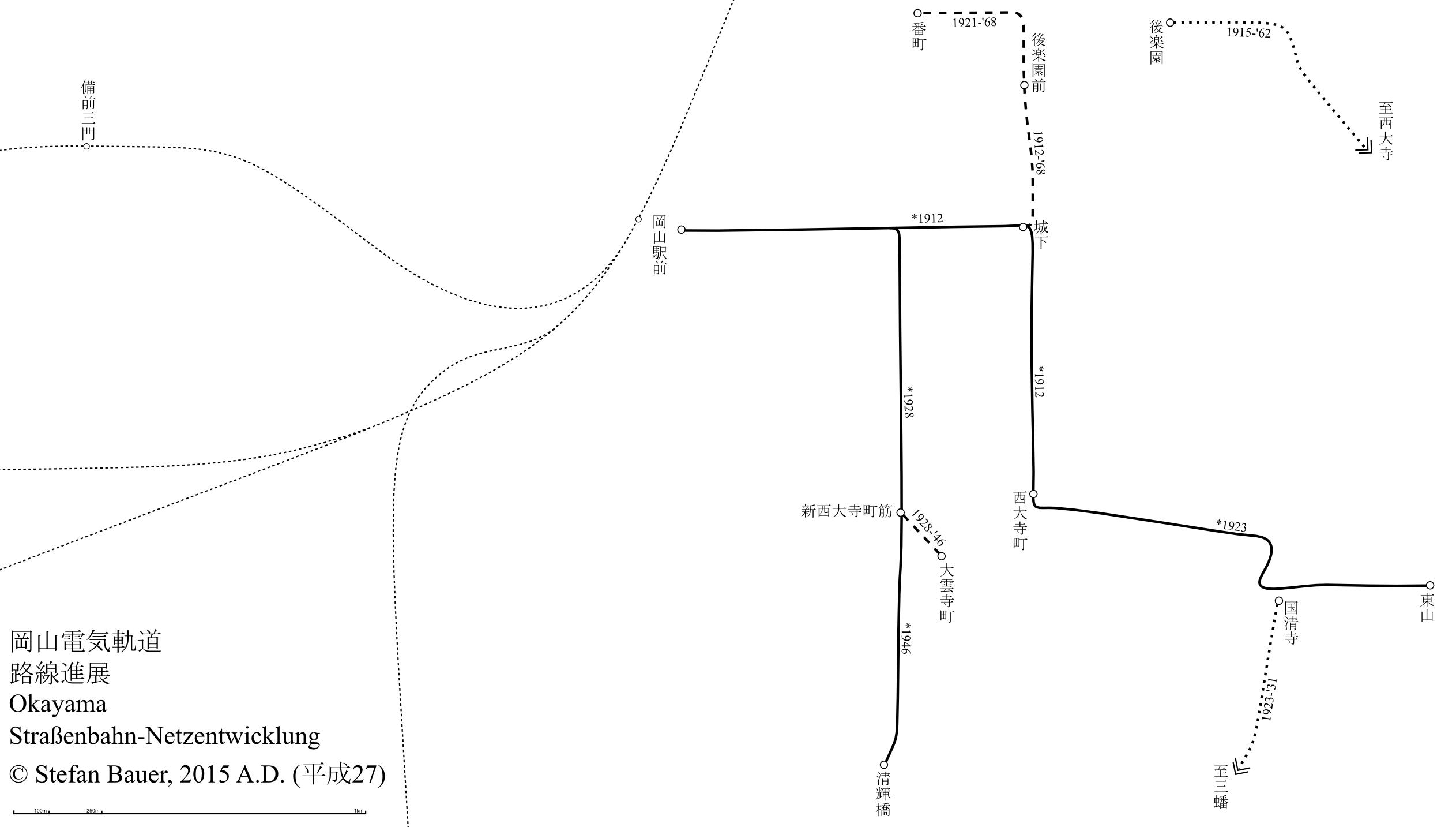 岡山電気軌道の路線進展図